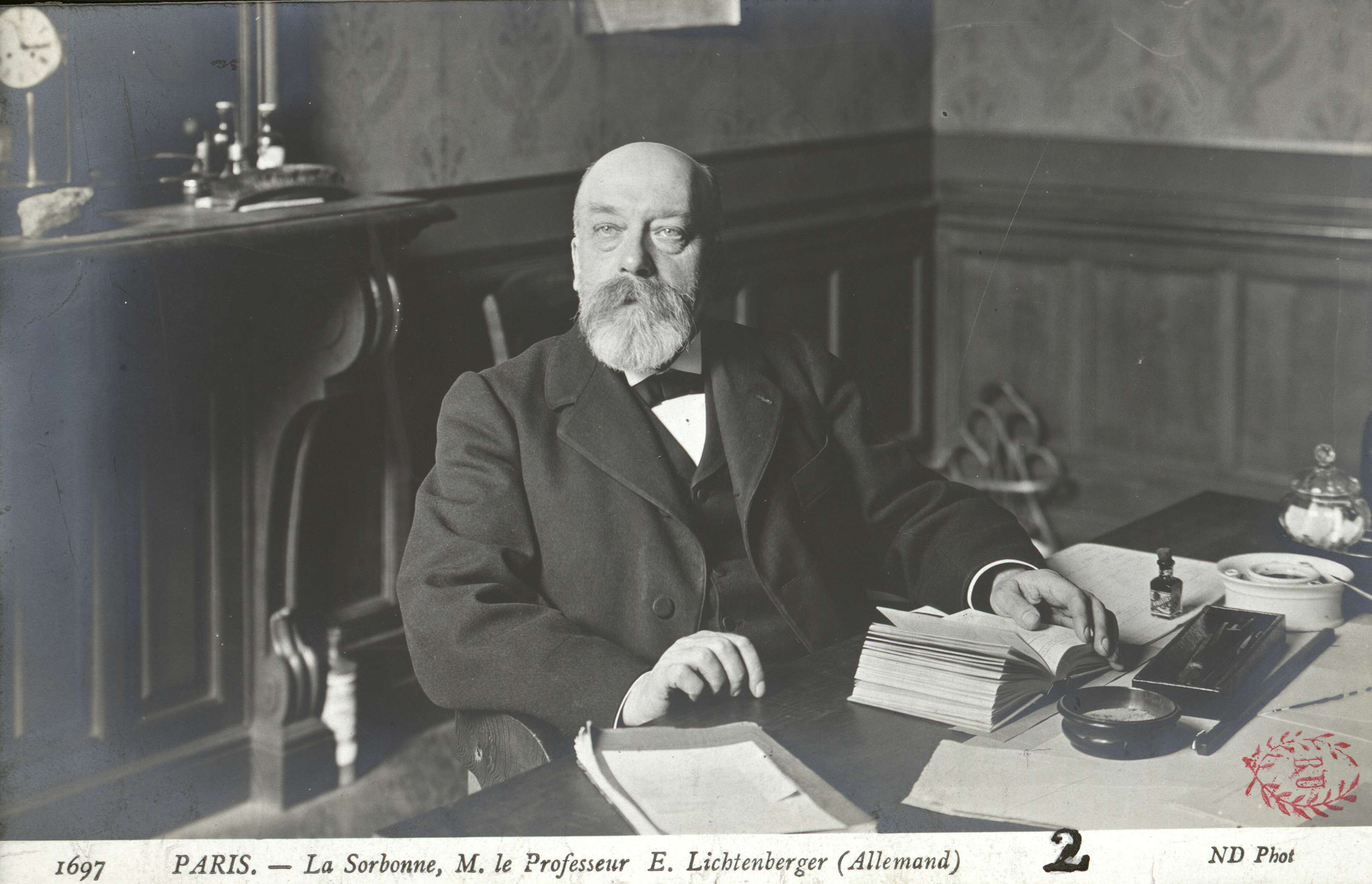 Carte postale photographique